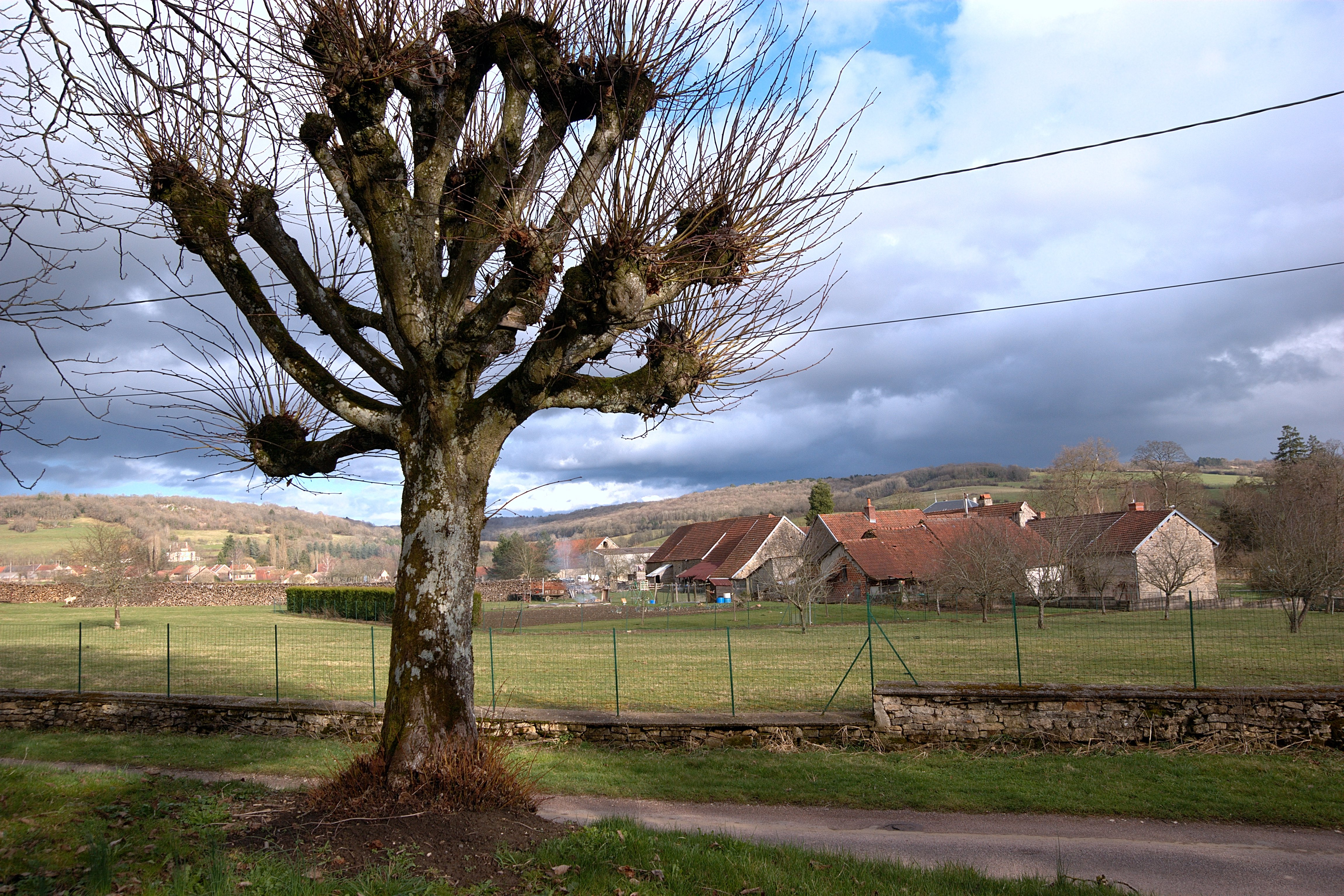 Bellenot-sous-Pouilly (Côte-d'Or, France)